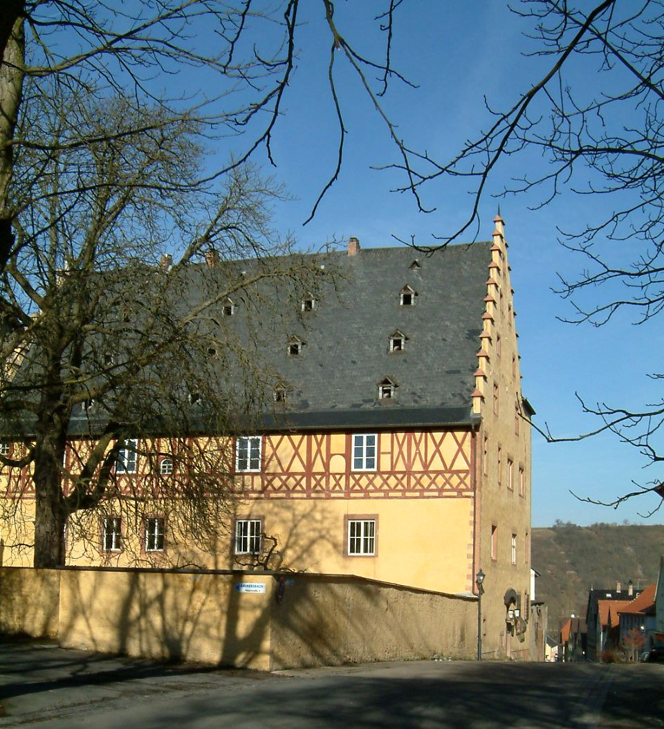 Ehemaliges Burgsinnschloss